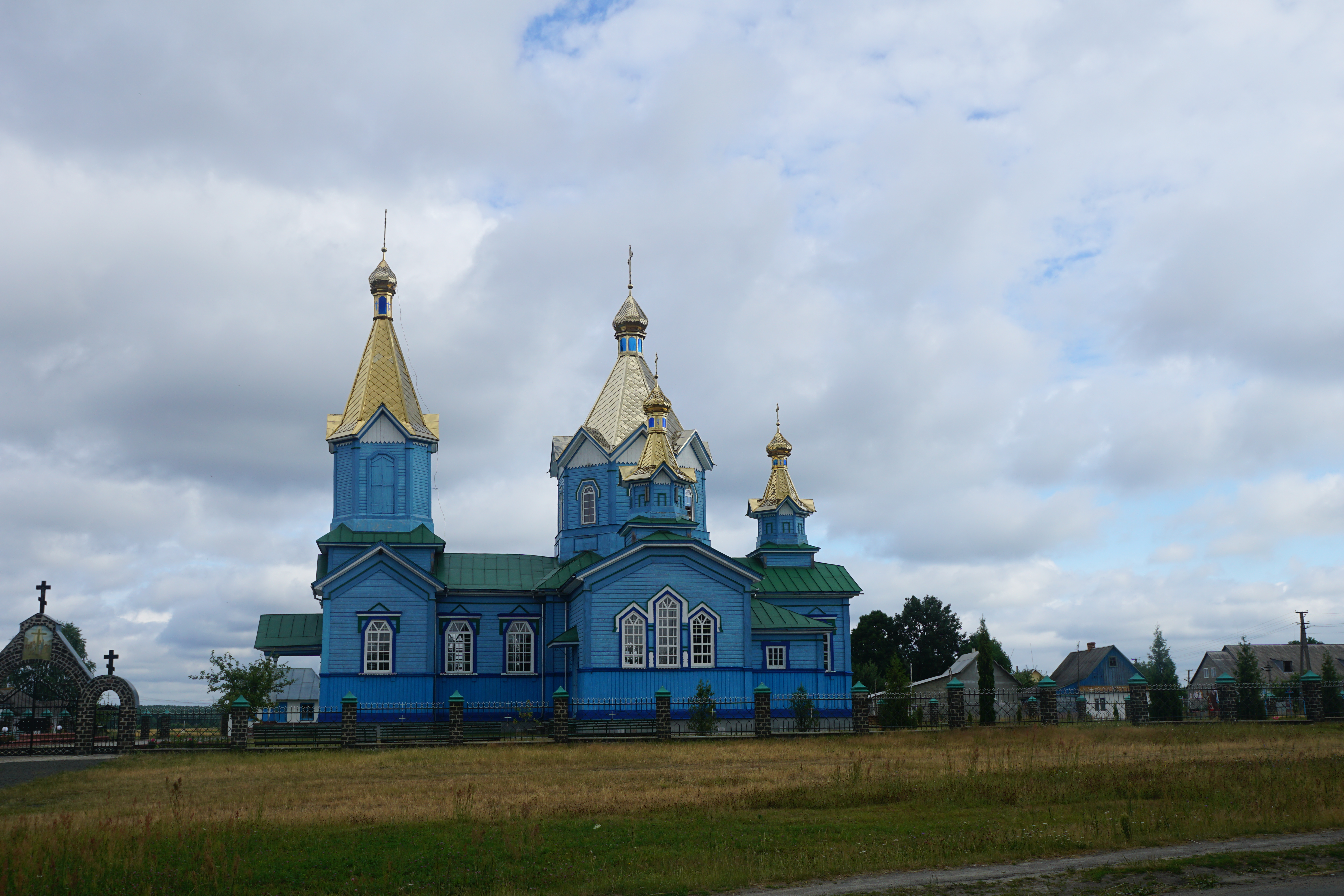 с. Полиці Володимерецького р-ну, дерев'яна церква Воздвиження Животворящого Хреста Господнього, УПЦ МП, 1901